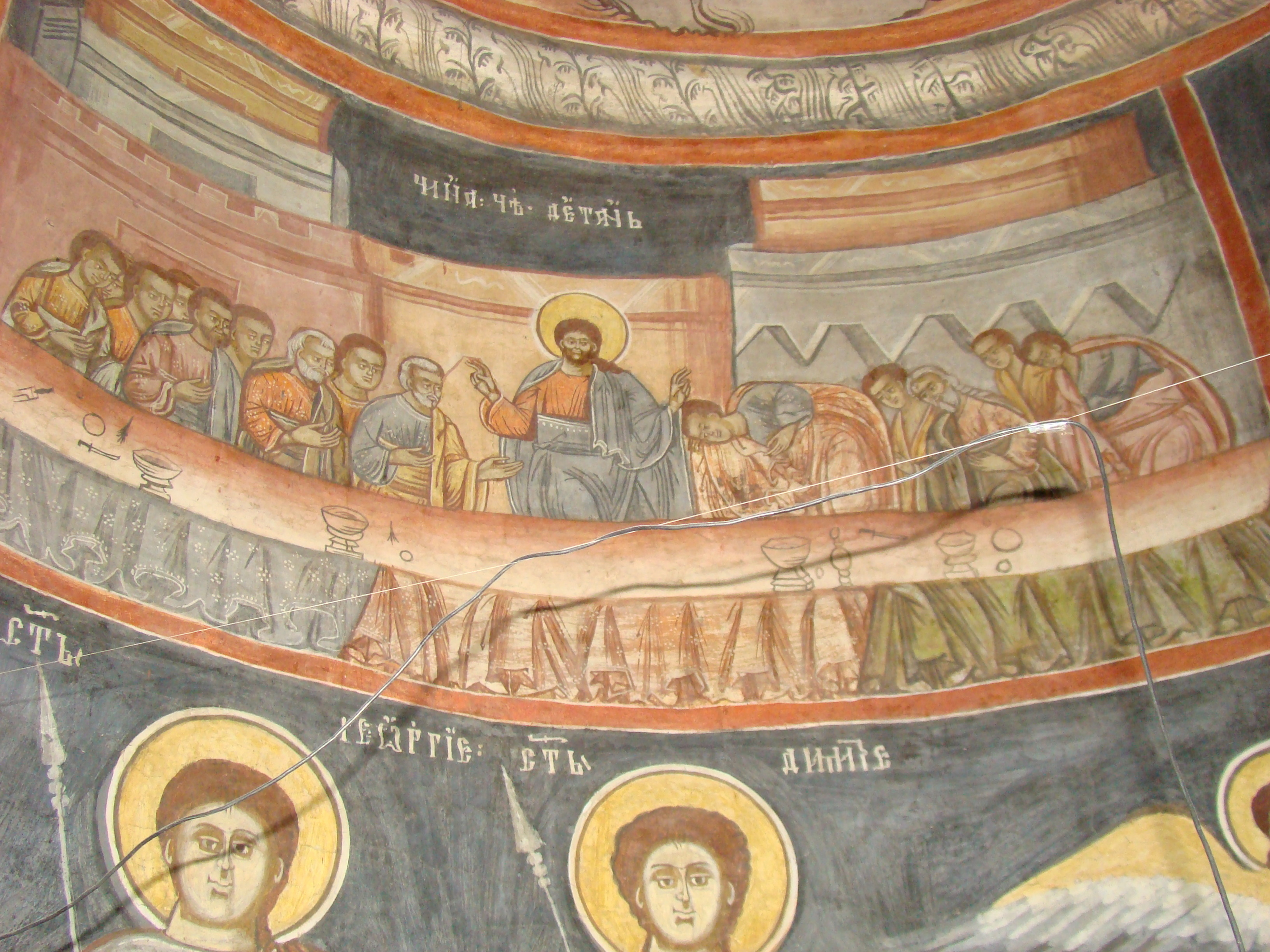 Biserica „Sfinţii Ioachim și Ana”, sat Târgu Logrești; comuna Logrești 01